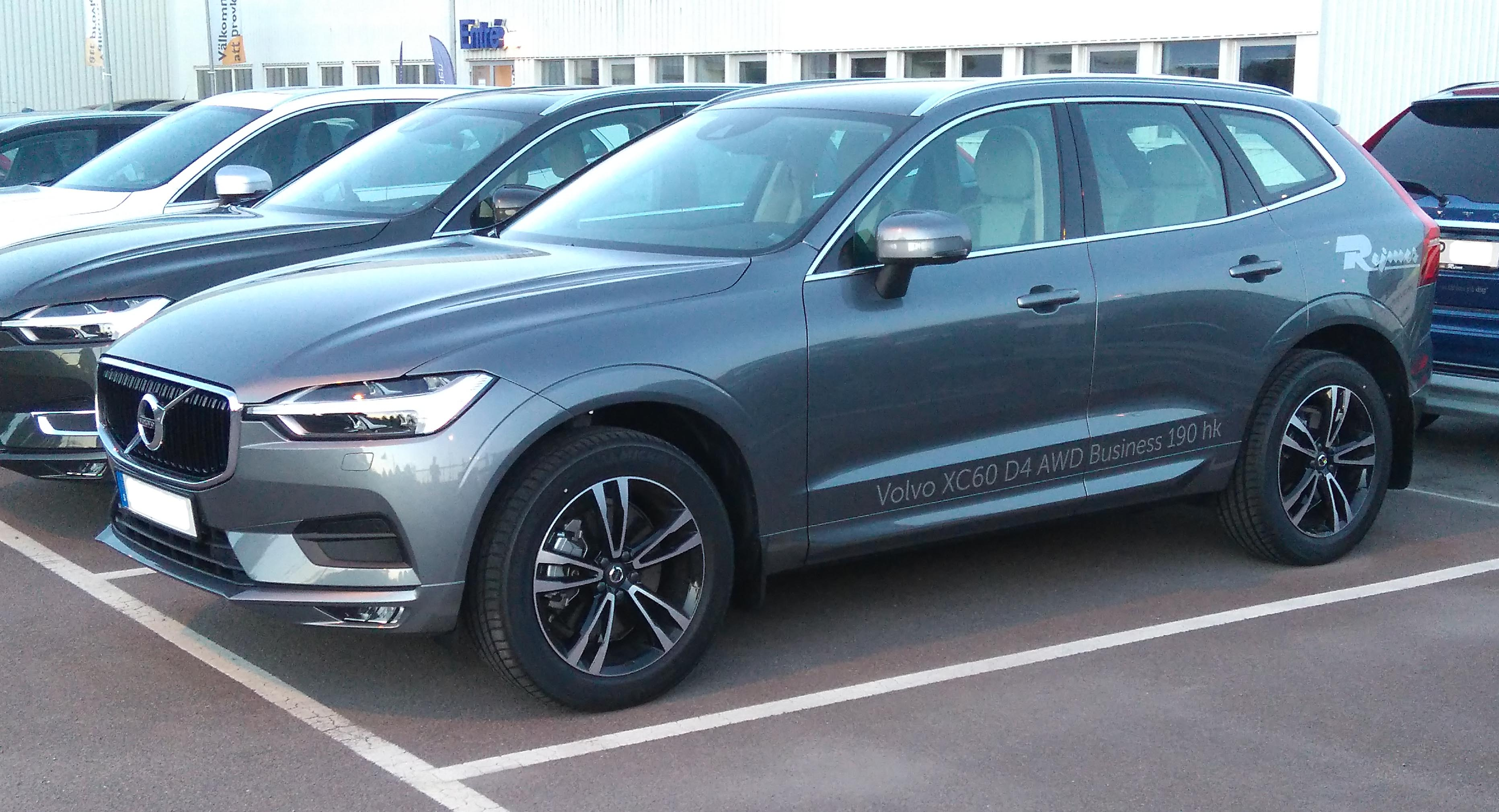 2017 Volvo XC60 D4